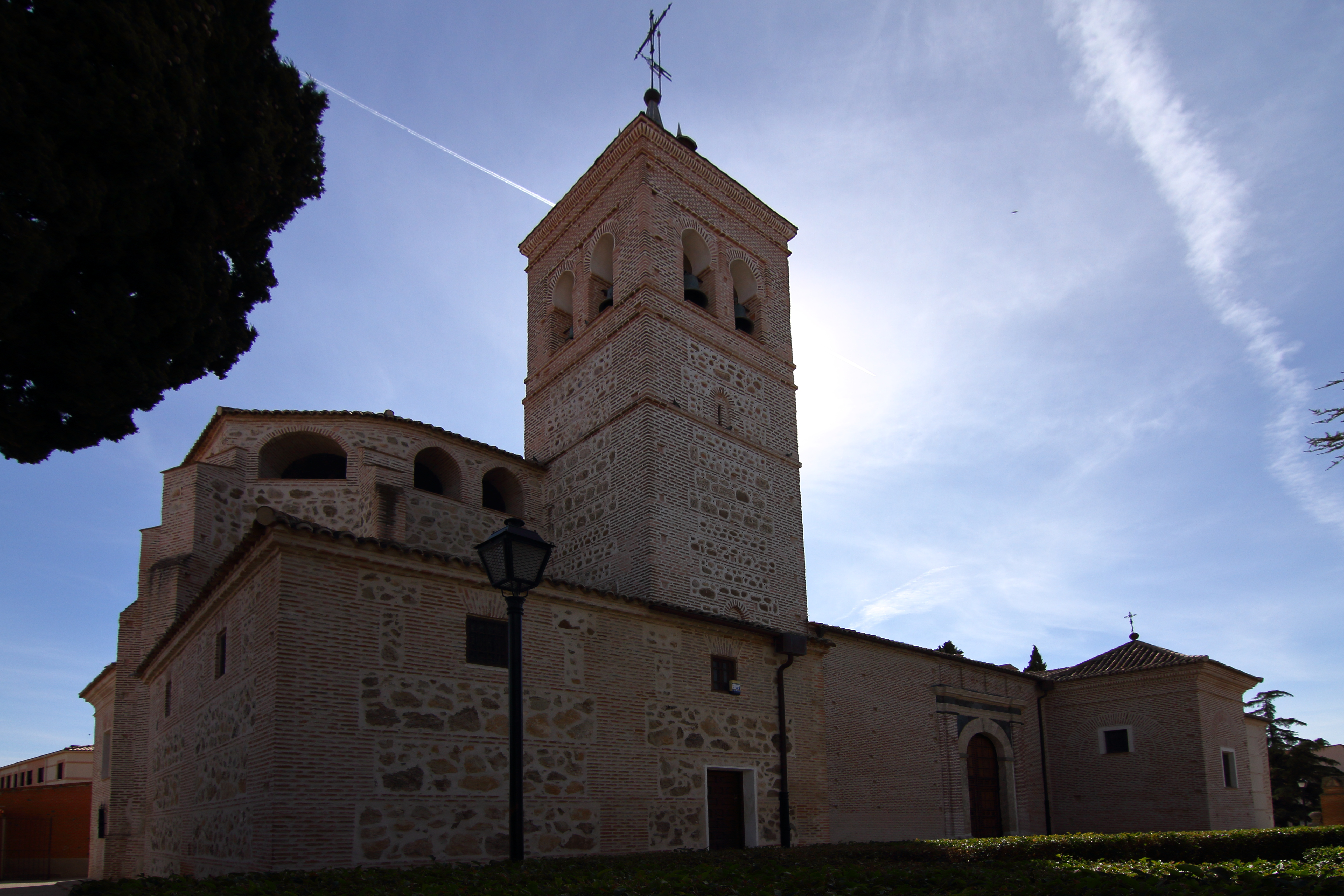 Iglesia de San Juan Bautista en Camarena